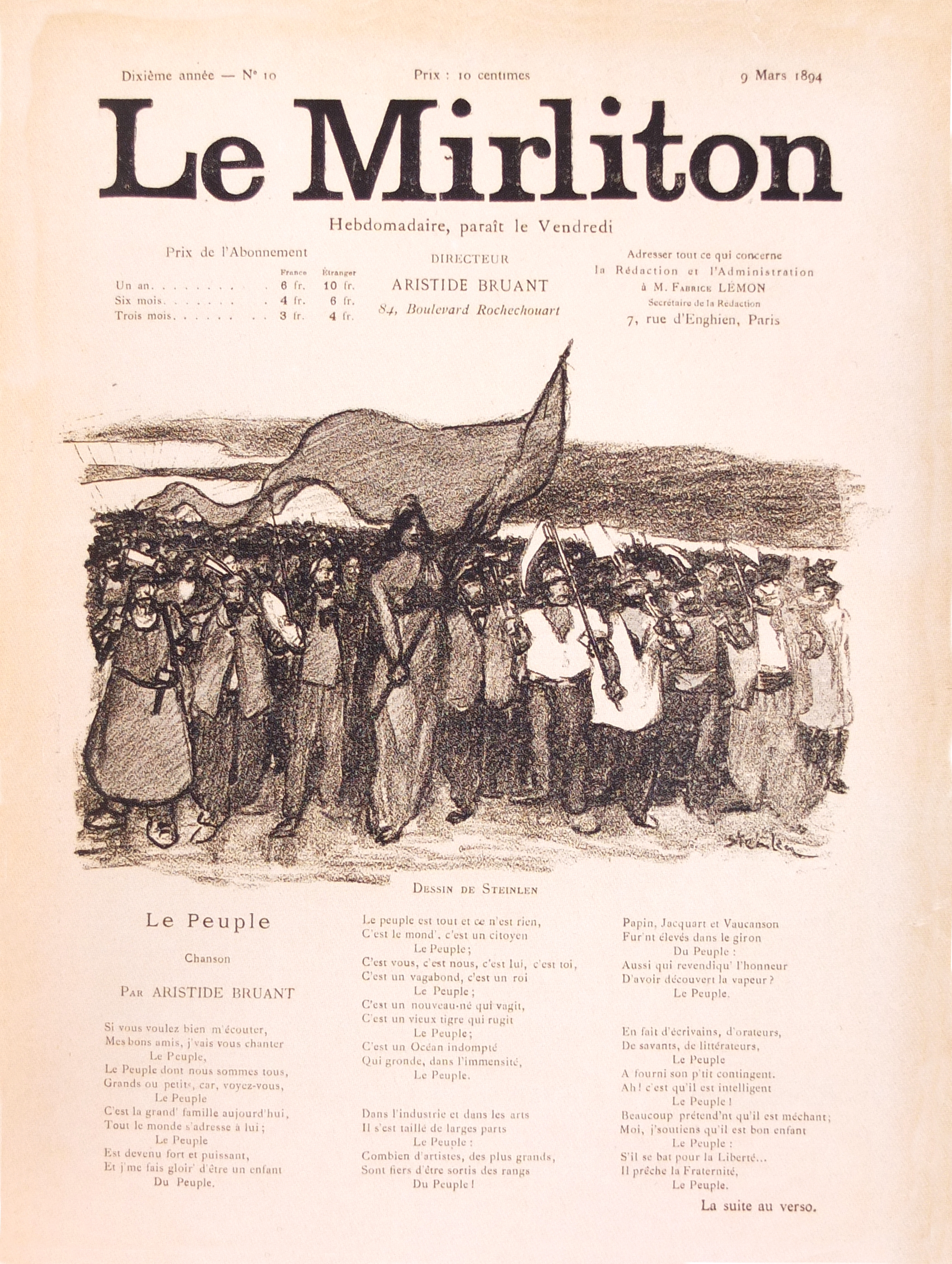 Le Mirliton, hebdomadaire dirigé par Aristide Bruant, n°10, 9 mars 1894. Dessin de Théophile Alexandre Steinlen, texte de la chanson Le Peuple d'Aristide Bruant.